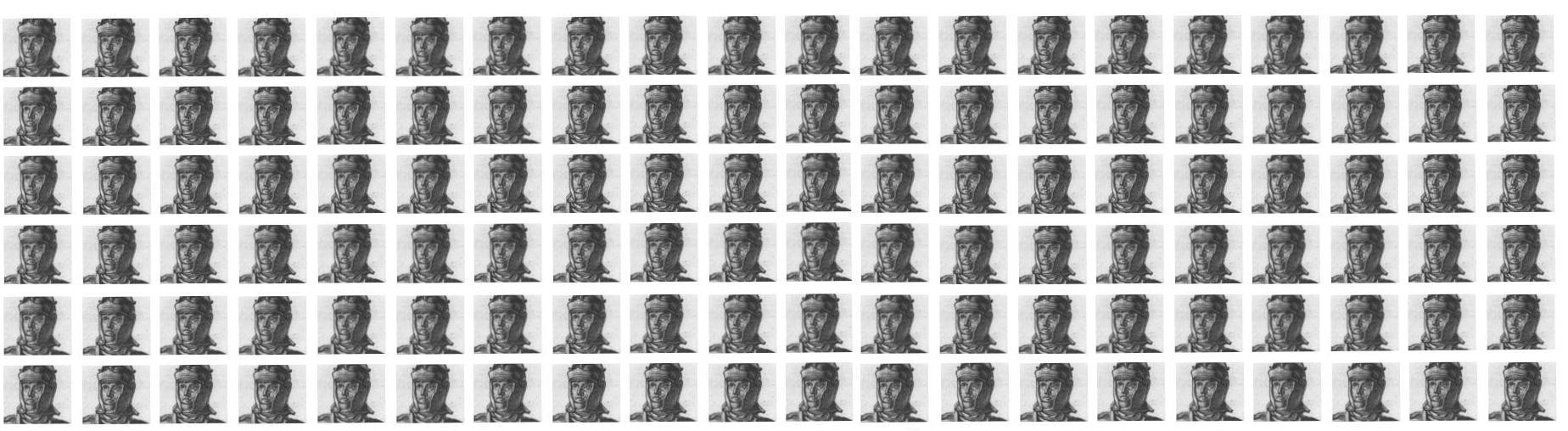 roman manipuli